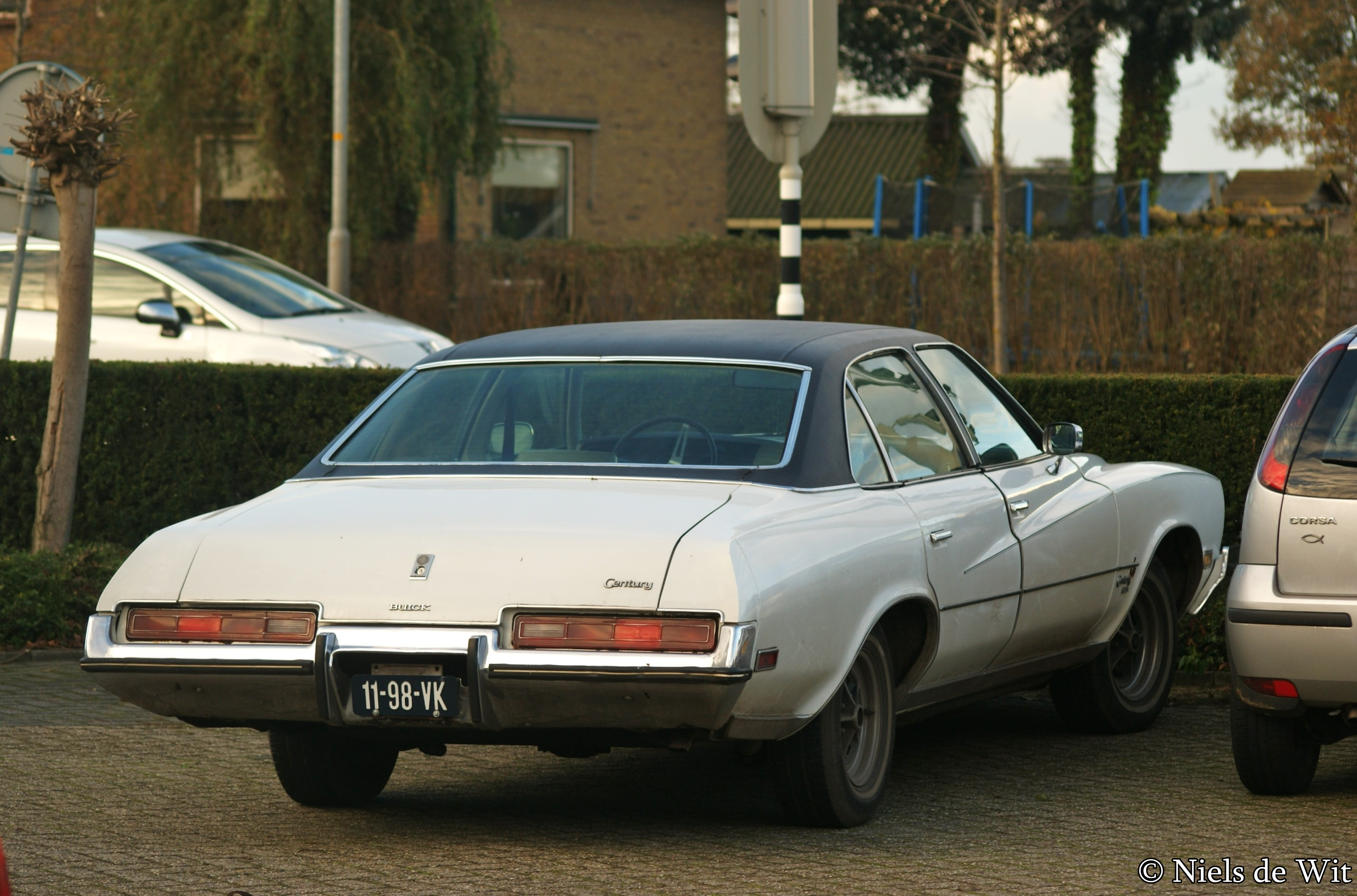 11-98-VK